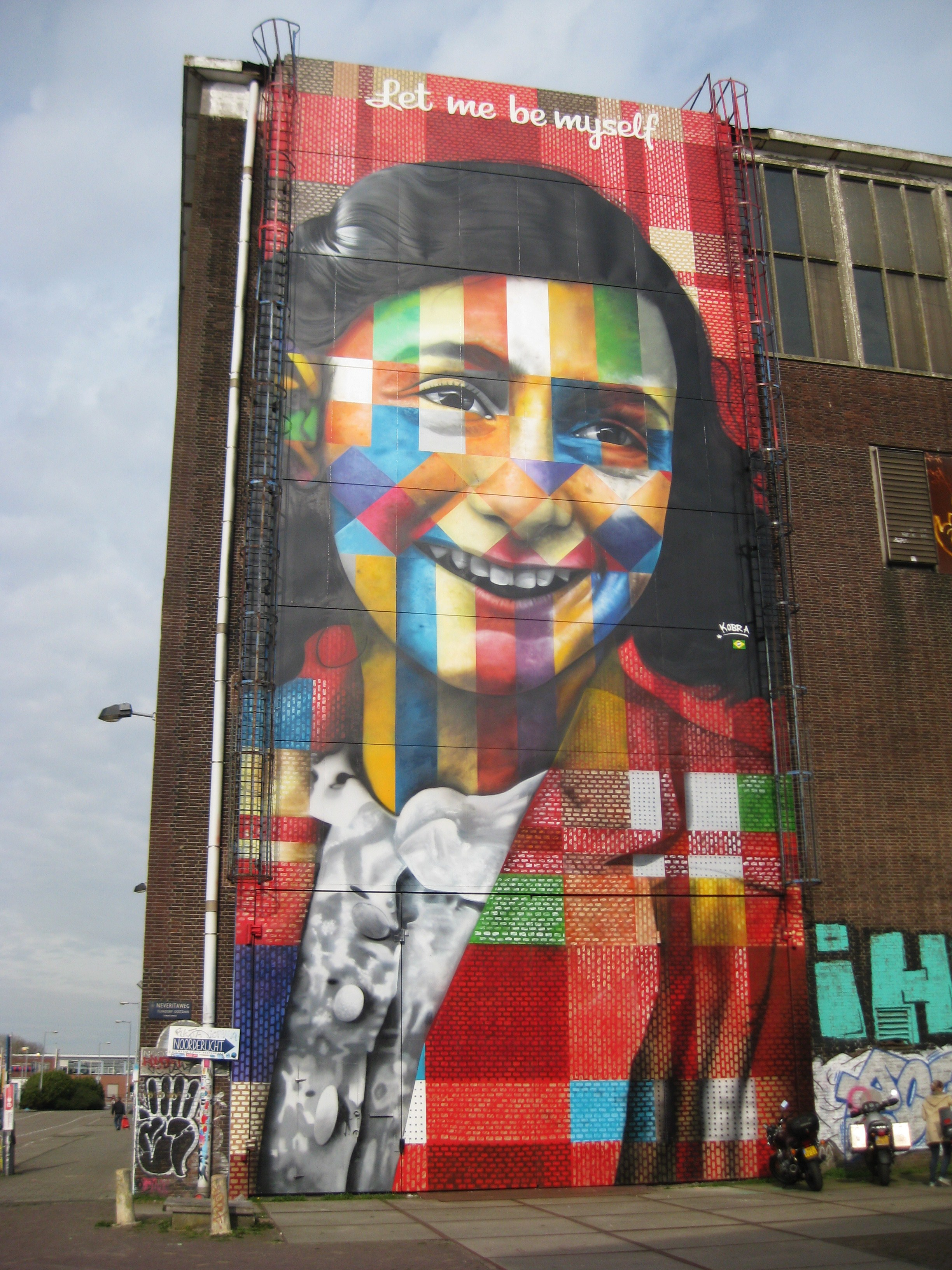 Let Me Be Myself (Anne Frank), street art van Eduardo Kobra op de lasloods op de voormalige NDSM-werf in Amsterdam, waar in 2018 het Street Art Museum gevestigd zal worden.